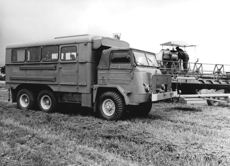 Werkstattwagen einer RTS ADN-ZB Ludwig-31.7.74 Bez.Erfurt: Erntepremiere hat dieser Werkstattwagen aus der VR Polen bei fliegenden Einsätzen auf den Feldern der KAP Riethnordhausen und Schlotheim. Die Arbeiter des Landtechnischen Dienstes Körner erfüllen damit ihre Bündnispflicht gegenüber den Genosssenschaftsbauern und sichern durch den ständigen Einsatz der Technik ein hohes Erntetempo. Der Werkstattwagen aus dem Bruderland ist technisch hervorragend ausgerüstet und ermöglicht auch größere Reparaturen direkt auf dem Feld.Diese gute Zusammenarbeit zwischen einem Kreisbetrieb für Landtechnik und Kooperativen Abteilungen Pflanzenproduktion ist eine Gewähr für hohes Erntetempo bei bester Qualität und geringsten Verlusten. (vergl. 0731/1N)